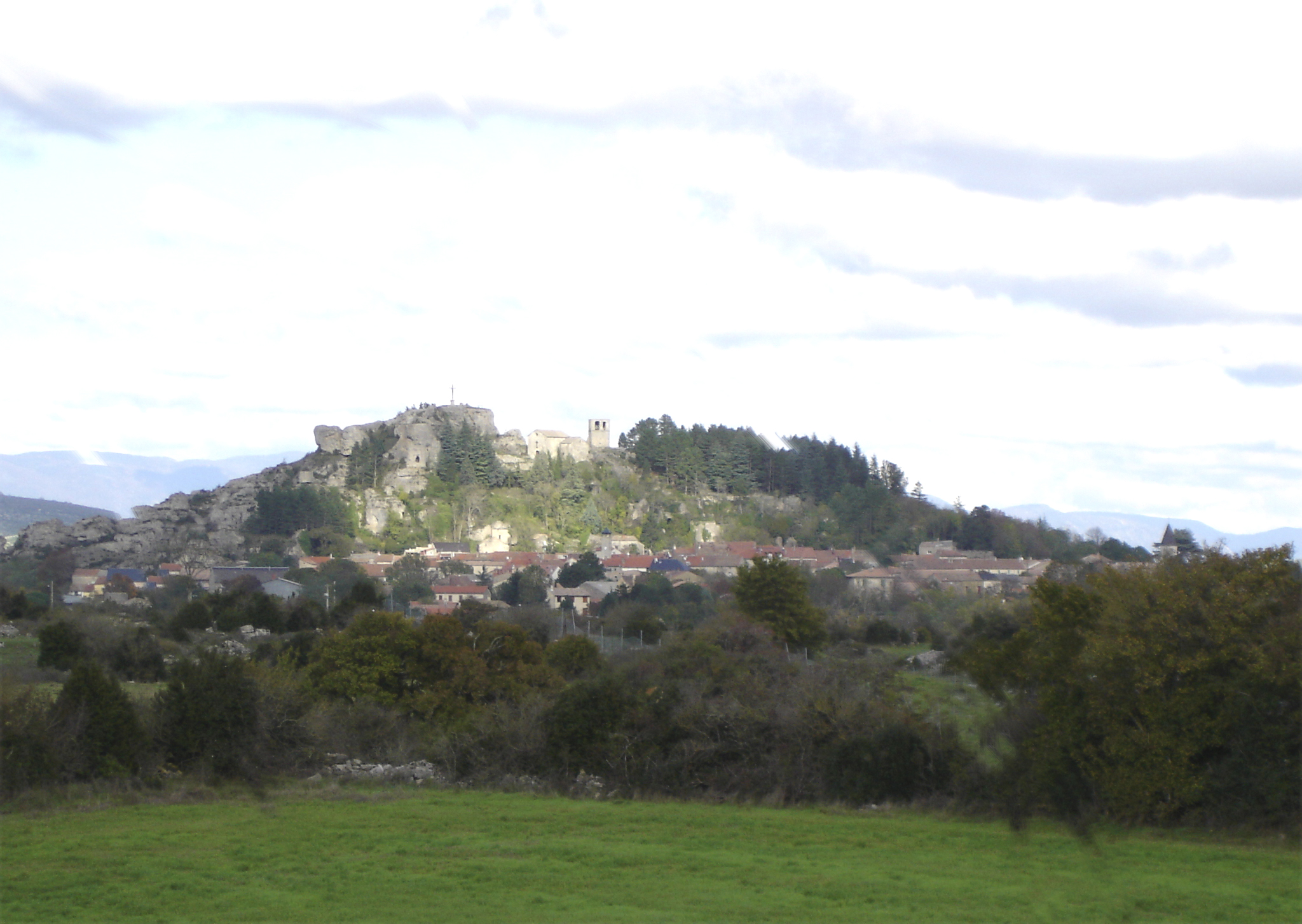 Le Caylar